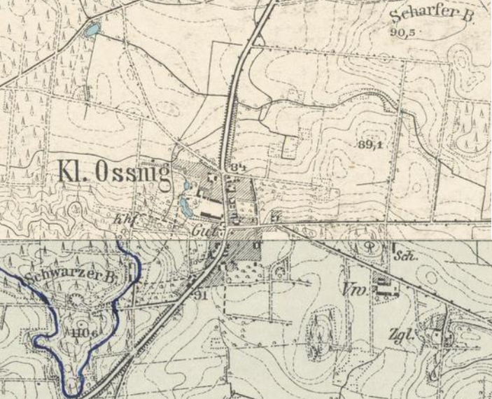 Klein Oßnig, Gemeindeteil von Schorbus, Ortsteil der Stadt Drebkau, Lkr. Spree-Neiße, Brandenburg, Ausschnitte aus den Meßtischblätter 4251 Cottbus West (1903) und 4351 Drebkau (1919), kombiniert